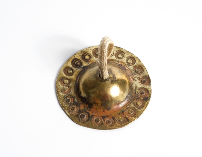 Een stel koperen vingerbekkentjes. Het zijn zg. concussie-idiofonen: soortgelijke voorwerpen worden tegen elkaar geslagen. Ze worden gebruikt als ritmische begeleiding. Bekkens of cymbalen hebben een lange historie in Azië, het Midden-Oosten, en Europa. De grootte varieert van bekkens, elk in een hand, tot vingerbekkentjes. De laatstgenoemde werden in het Oude Egypte al bespeeld, alsmede door de Grieken en Romeinen (Diagram group, 1976:124).